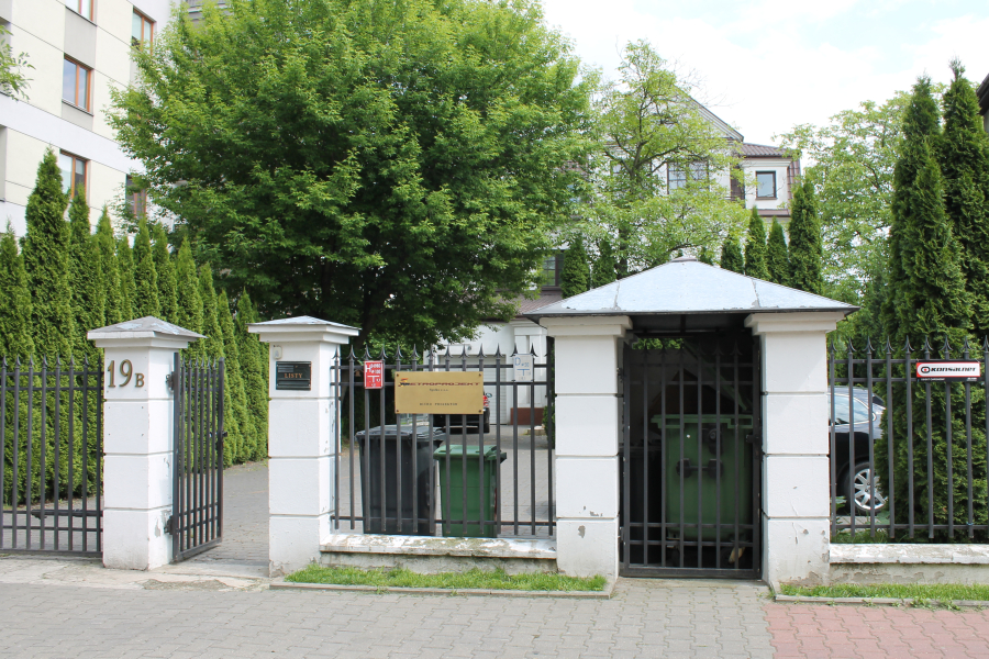 Siedziba Biura Projektów „Metroprojekt”.